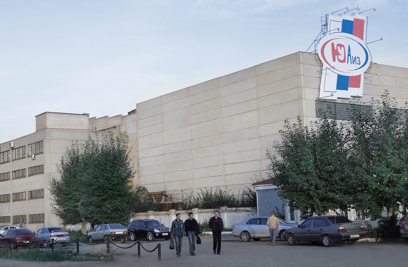 Южноуральский АИЗ